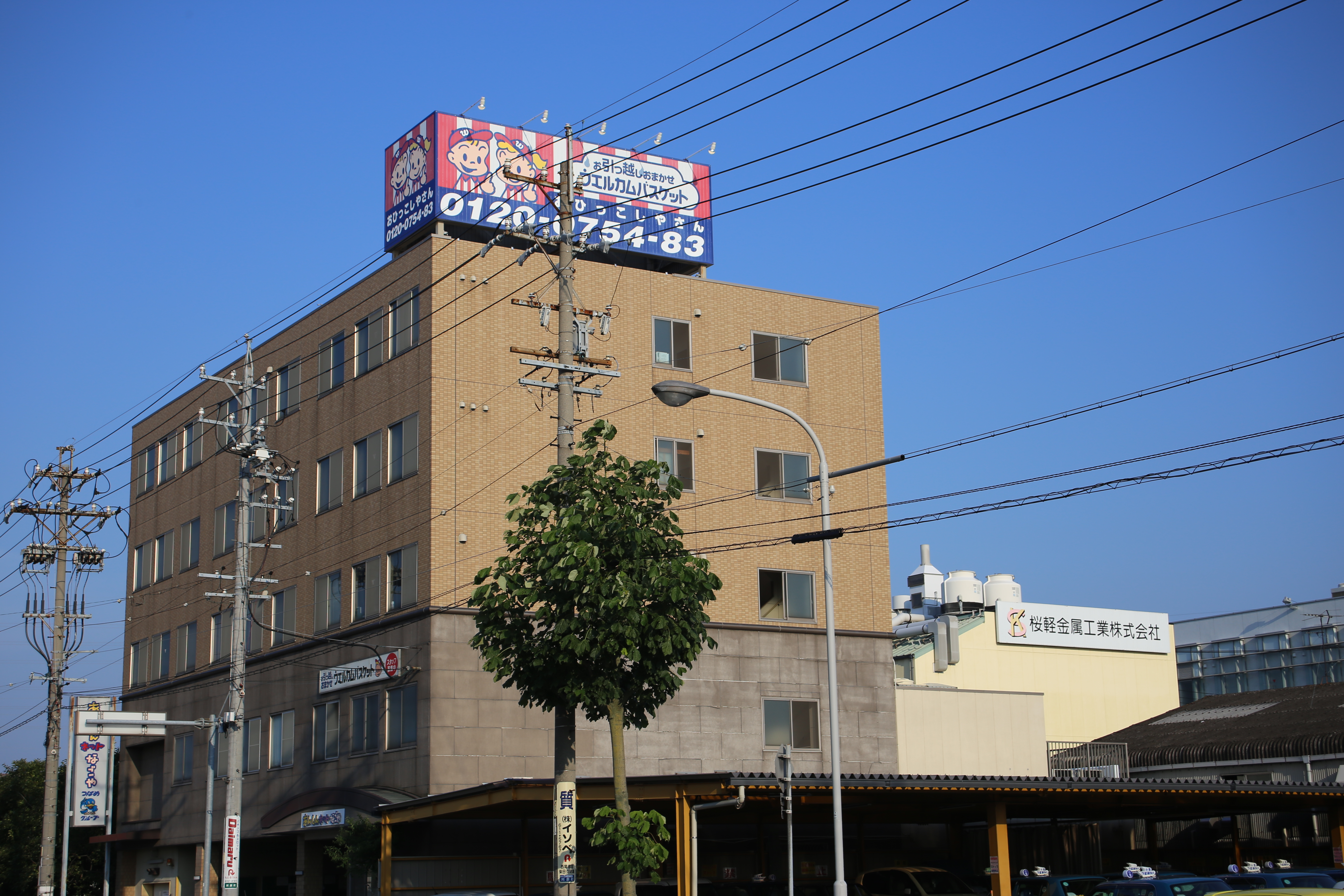 名古屋市南区阿原町のあんしんネットなごや本社を北側公道西側より撮影